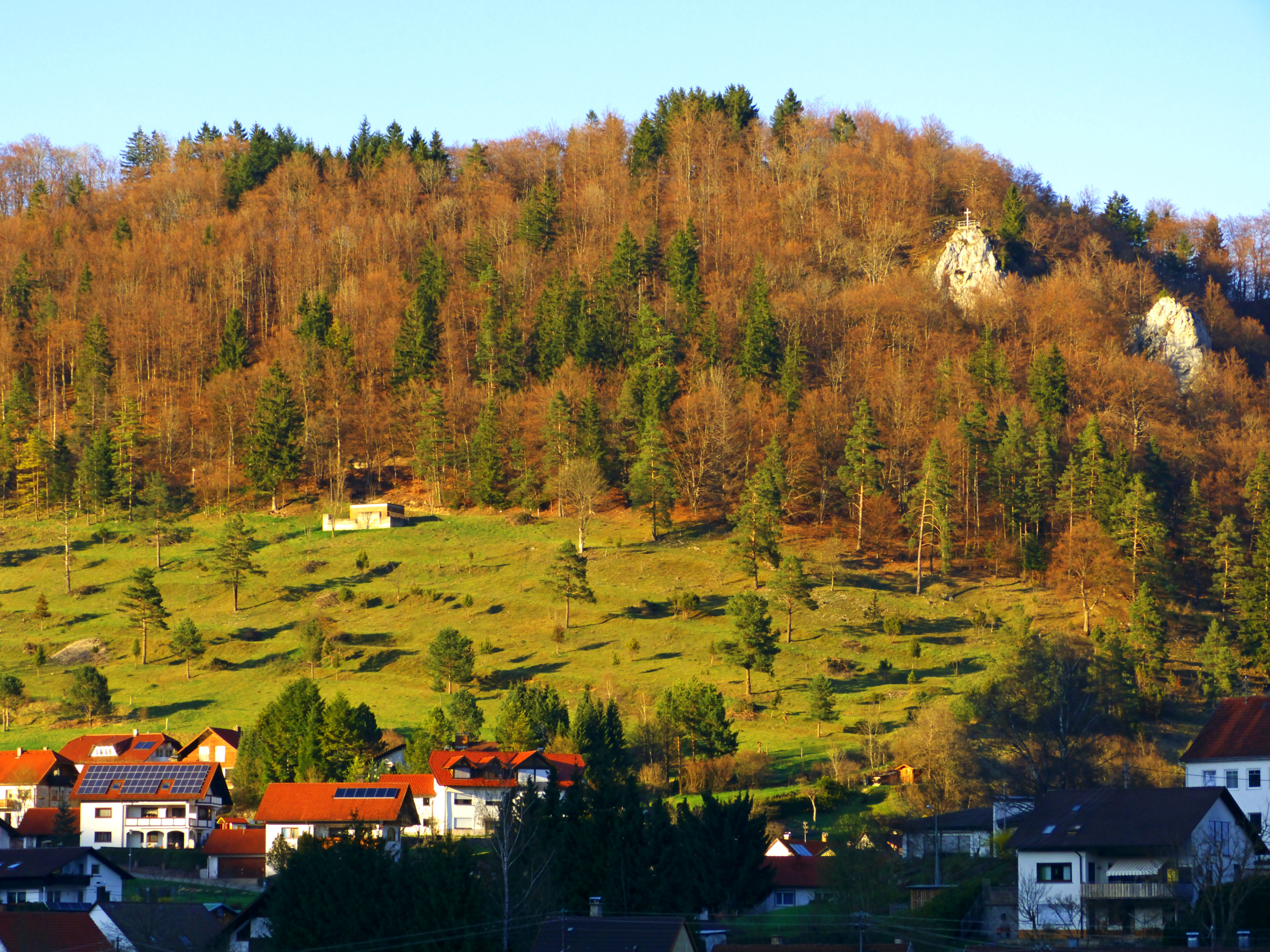 Bärenthal